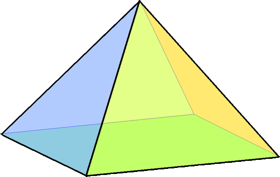 四角錐，半個雙四角錐